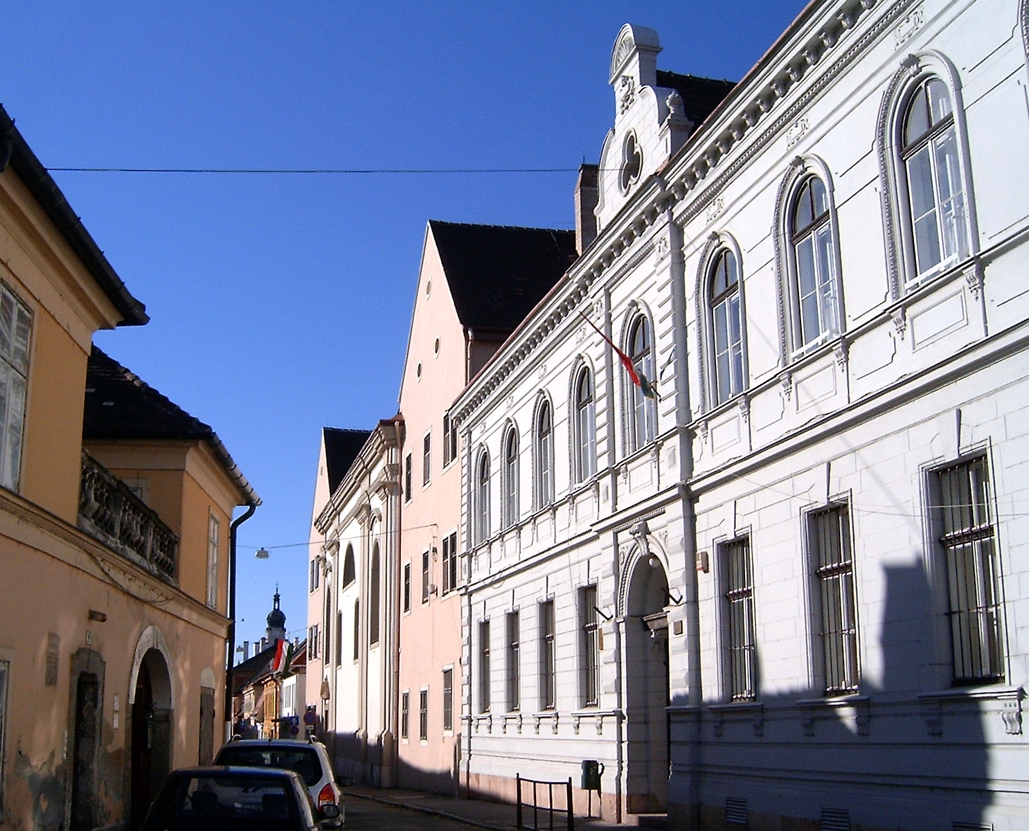 Az orsolyiták épületegyüttese Győrött, saját kép